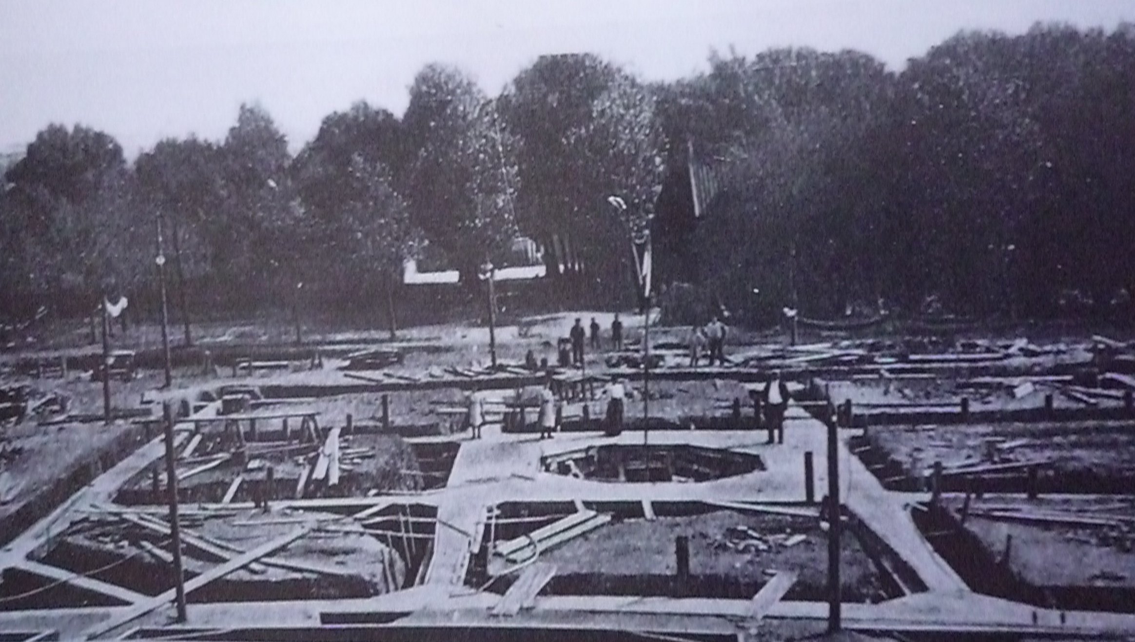 La fosse no 2 dite Saint-Émile de la Compagnie des mines de Marles était un charbonnage du bassin minier du Nord-Pas-de-Calais constitué d'un seul puits situé à Marles-les-Mines, Pas-de-Calais, Nord-Pas-de-Calais, France. L'avaleresse no 1 est localisée sur le site. Le chevalement de la fosse no 2 avec les parties anciennes du bâtiment de la machine d'extraction sont inscrits aux monuments historiques le 6 mai 1992. La fosse est également inscrite sur la liste du patrimoine mondial par l'Unesco le 30 juin 2012 et y constitue le site no 101.